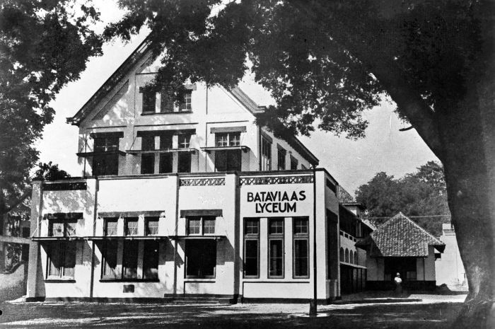 Repronegatief. Lyceum te Batavia